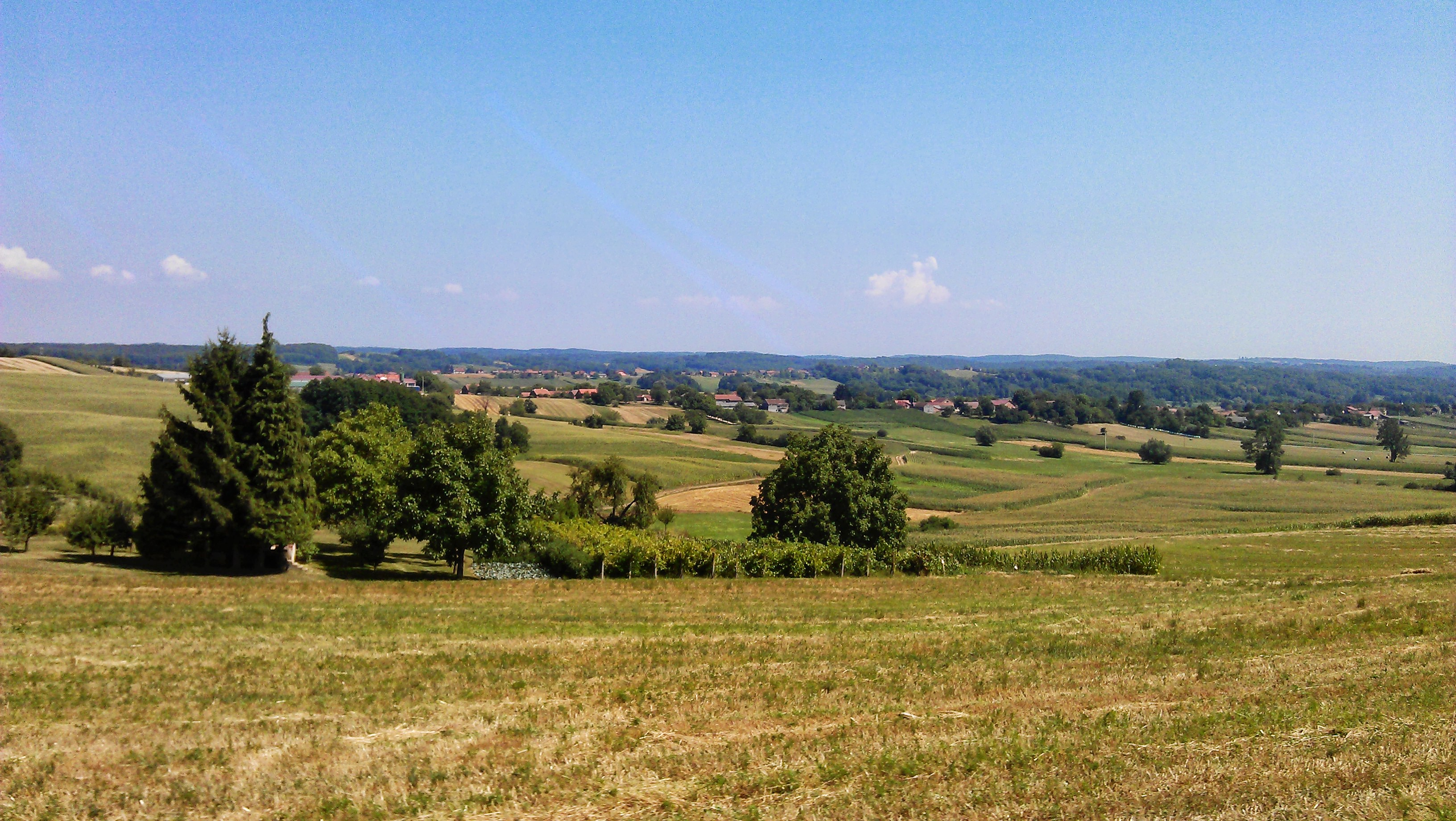 Ćurlovac